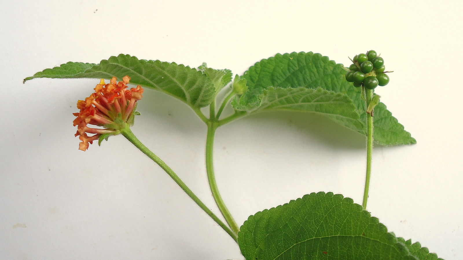 Lantana tiliaefolia Cham.